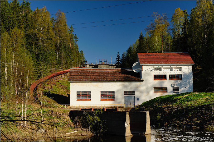 Питкякоски ГЭС. Вид со стороны нижнего бьефа